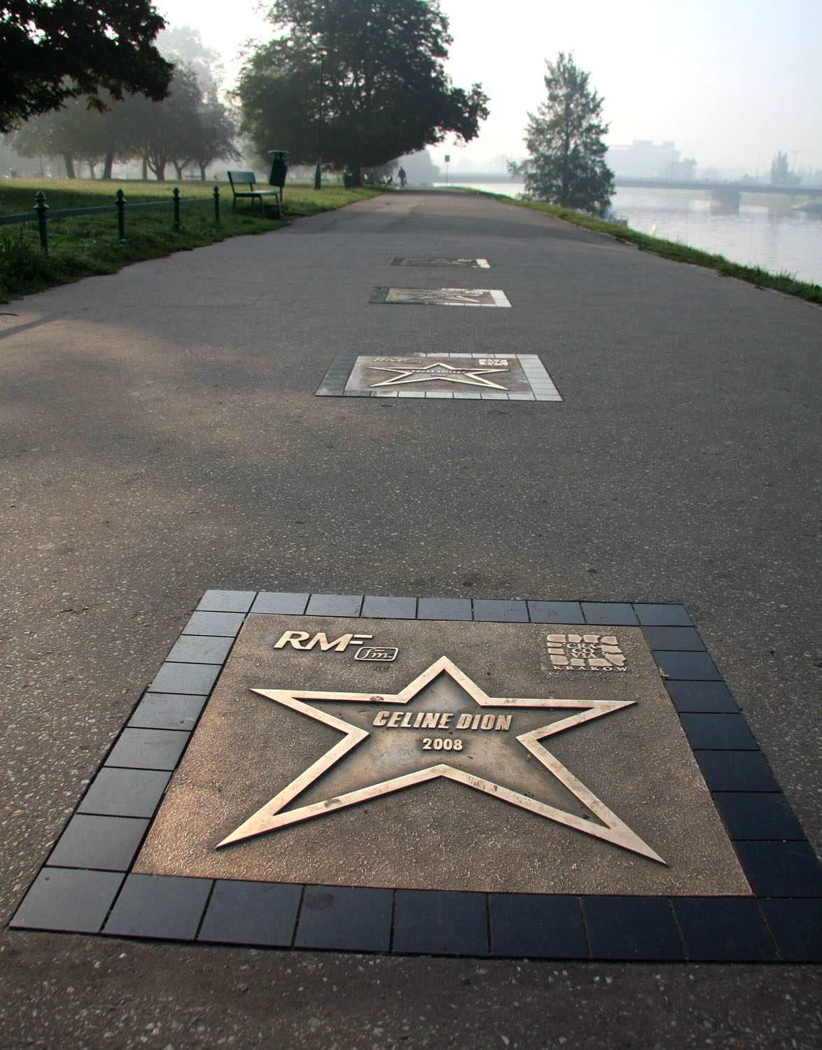 Muzyczna Aleja Gwiazd w Krakowie